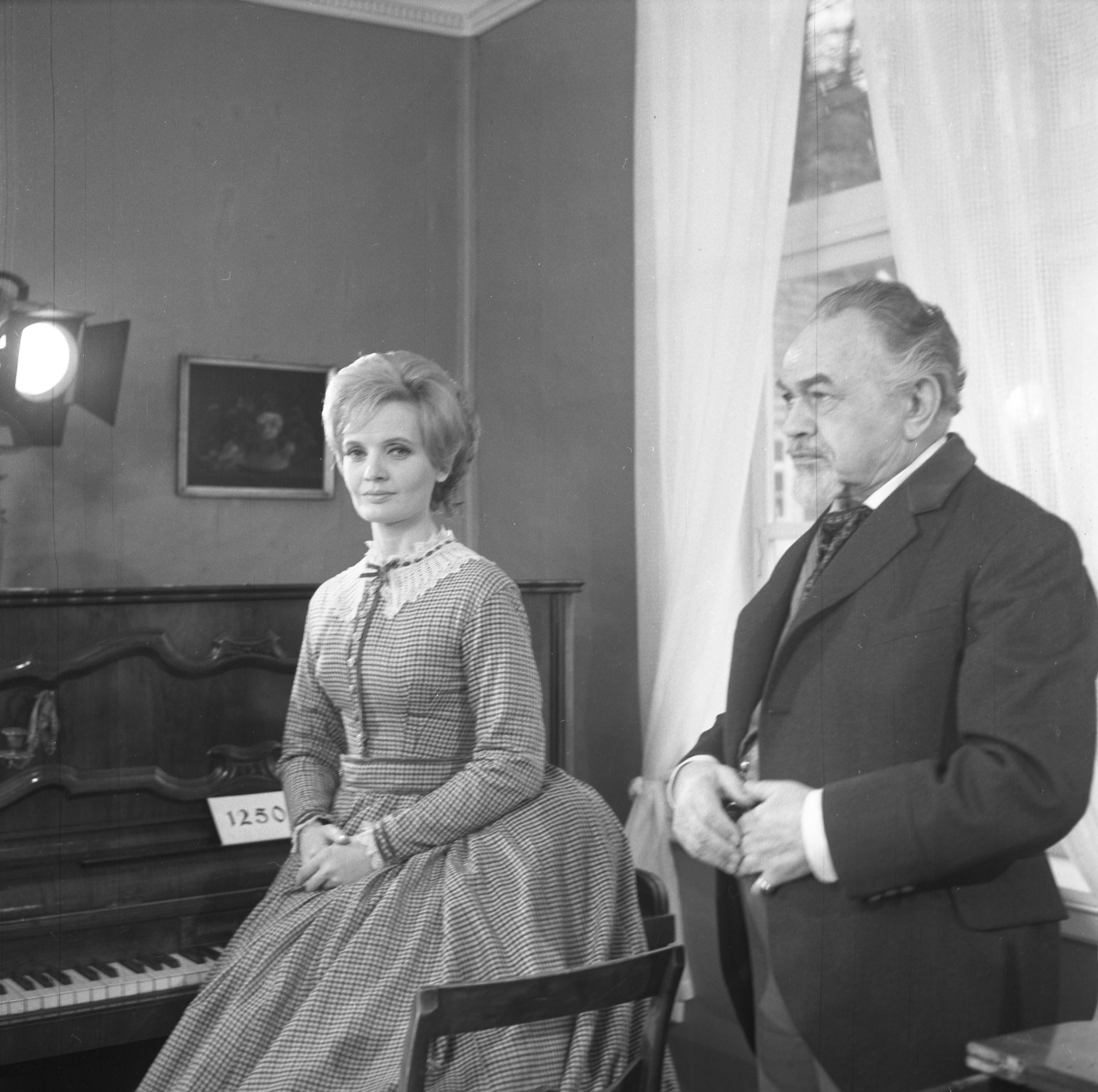 Format: 120 mm sort/hvitt negativ Dato/Date: April 1969 Fotograf/Photographer: Eirik Sundvor (1902–992) Sted/Place: Bergen, Hordaland Wikipedia: Florence Henderson (1934–2016) Wikipedia: Edward G. Robinson (1893–1973) Eier/Owner Institution: Trondheim byarkiv, The Municipal Archives of Trondheim Arkivreferanse/Archive reference: Tor.H43.B78. Merknad: Skuespillerne Florence Henderson (Nina Hagerup) og Oskar Homolka (Engstrand) på filmsettet til musicalen om Edvard Grieg kalt "Song of Norway". Deler av filmen ble innspilt i Bergen i april 1969, og filmen ble utgitt i USA den 4 November 1970. Toralv Maurstad spilte hovedrollen som Edvard Grieg. Florence Henderson, mest kjent som Carol Brady i "The Brady Bunch", spilte Edvard Griegs framtidige kone Nina Hagerup. Regissøren omtalte Henderson som den nye Julie Andrews.